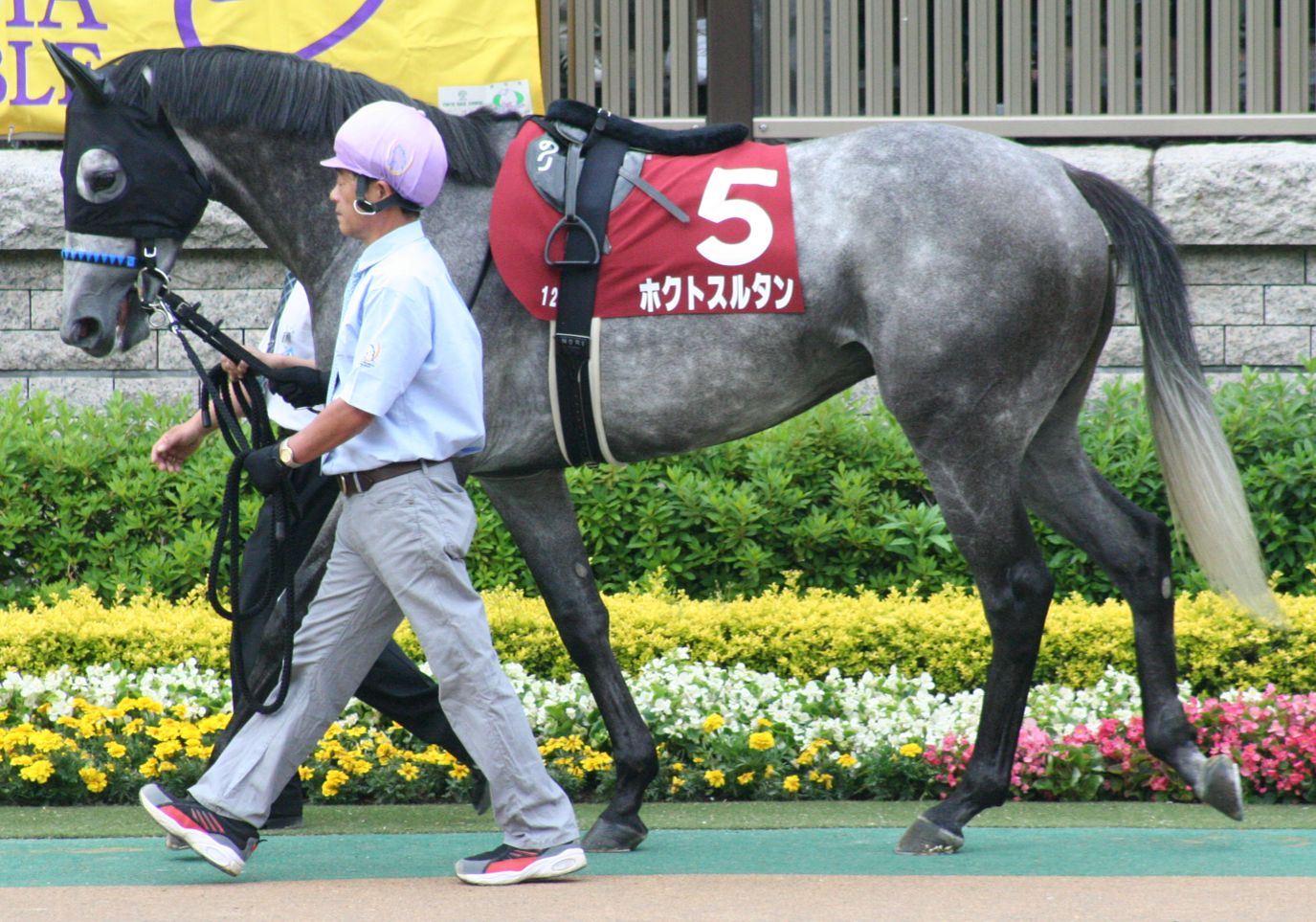 ホクトスルタン（東京競馬場）